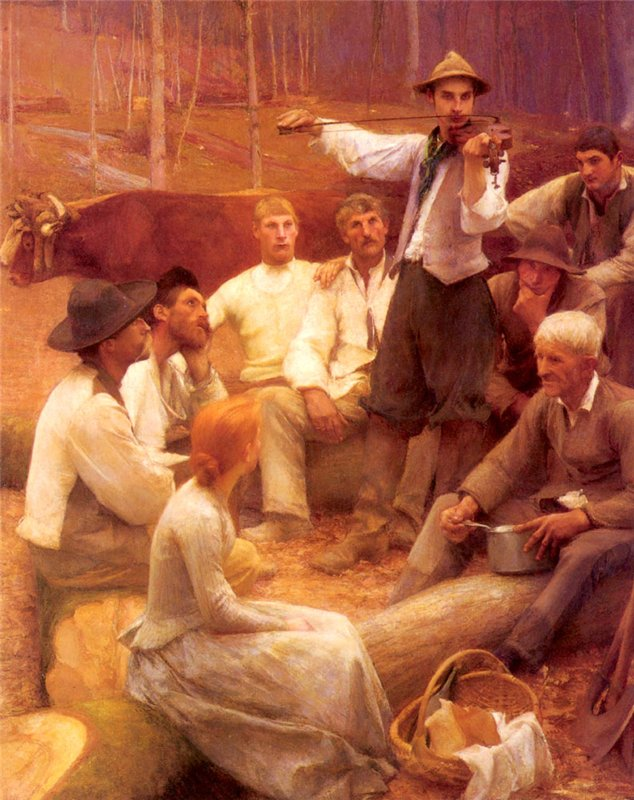 Паскаль Адольф Жан Даньян-Буве. На привале. 1892 г.